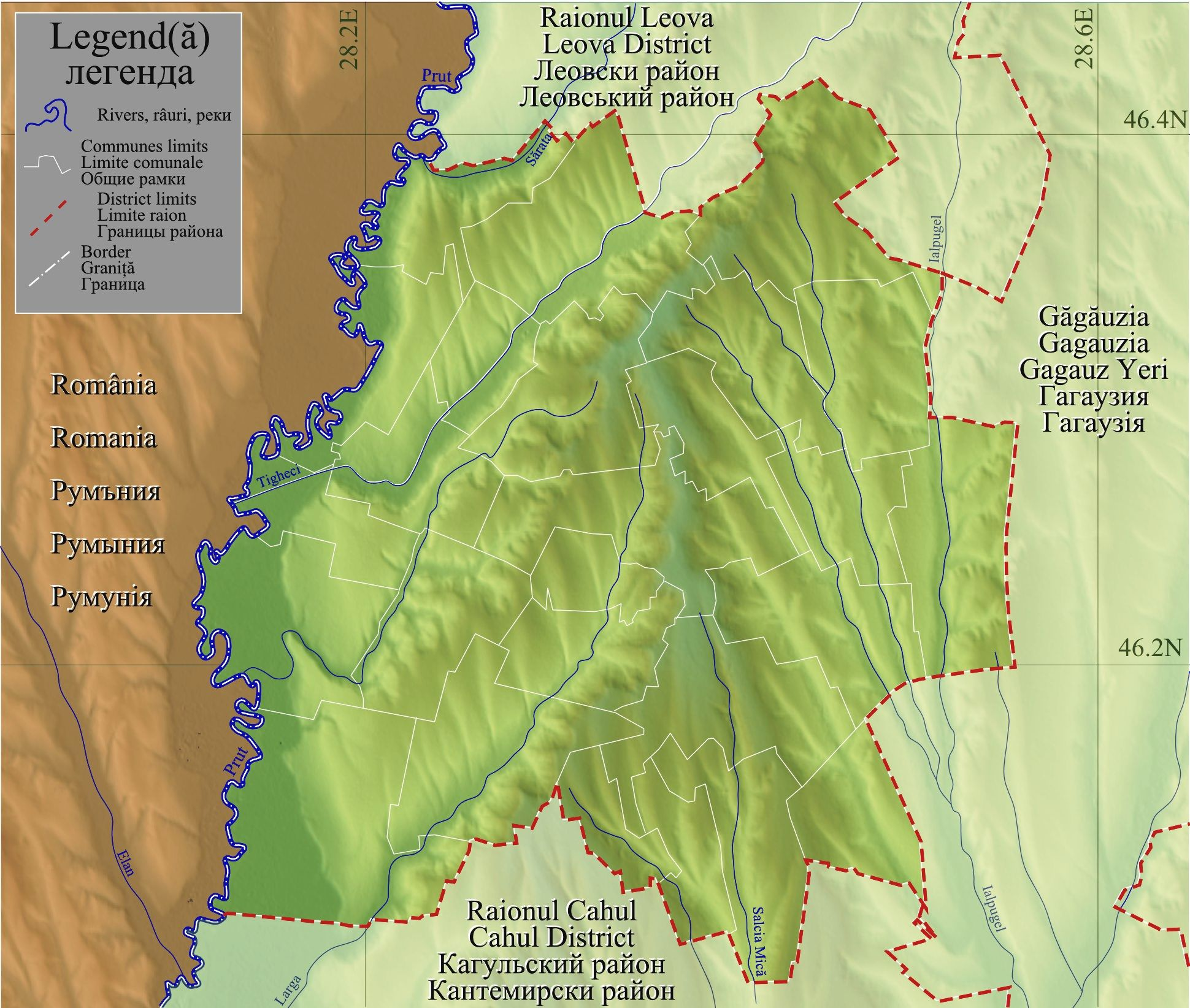 Harta de localizare a raionului Leova, Moldova.